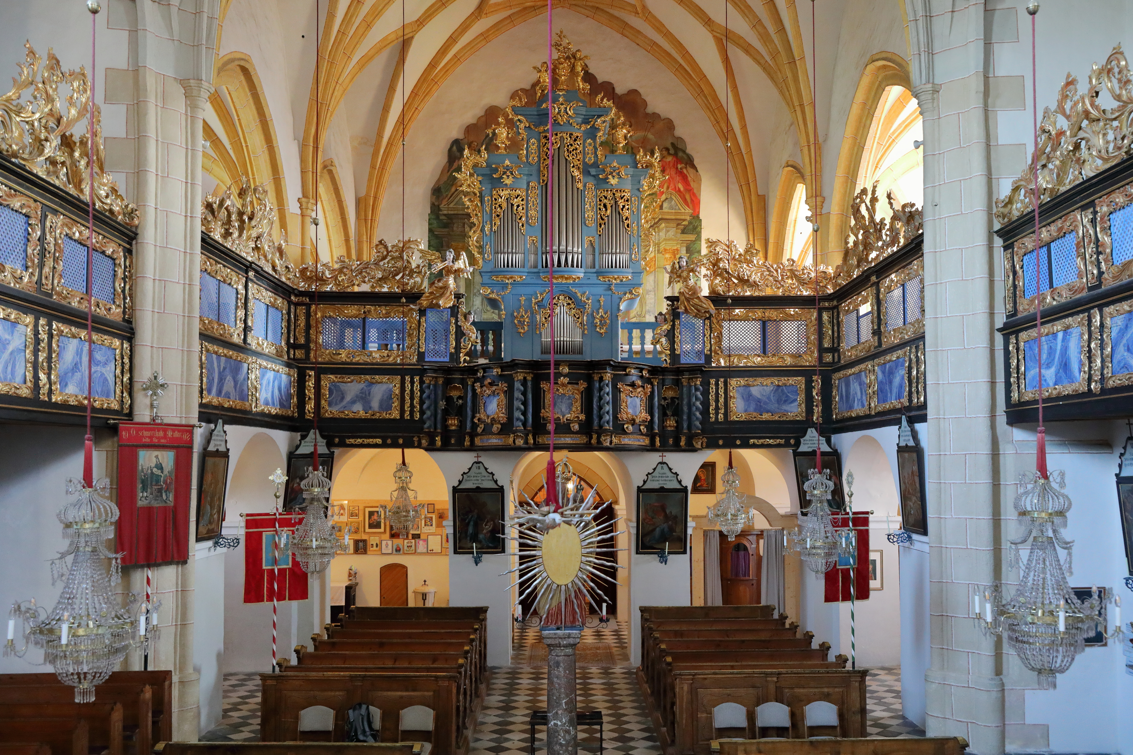 Blick in Richtung Orgelempore in der Wallfahrtskirche Maria Rehkogel in Frauenberg, ein Ortsteil der steirischen Marktgemeinde St. Marein im Mürztal.Die dreiachsige Orgelempore und die anschließenden Seitenschiffemporen mit geschnitzten Brüstungen wurden von 1682 bis 1688 eingebaut. Die Orgel mit prächtigem Gehäuse ist ein Werk des Orgelbauers Anton Josef Römer (* 28.2.1724 Brünn, † 14.7.1779 Graz) aus dem Jahr 1774/75.